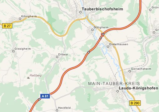 Dieses Bild ist ein Landkartenteil, der aus der Landkartendatenbank OpenStreetMap übernommen wurde. Im Bild ist Dittwar (ein Stadtteil von Tauberbischofsheim) mit seinen Nachbargemeinden (Tauberbischofsheim mit dem Dittwarer Bahnhof, Dittigheim mit Hof Steinbach, Distelhausen, Lauda-Königshofen mit Oberlauda und Heckfeld, Gissigheim und Königheim) zu sehen. In "rot" ist ein Ausschnitt der Bundesautobahn 81 zu sehen. Von links verläuft in "gelb" die Bundesstraße 27. Von rechts unten verläuft in "gelb" die Bundesstraße 290. Von Süd nach Nord verläuft der Fluss Tauber sowie die Taubertalbahn